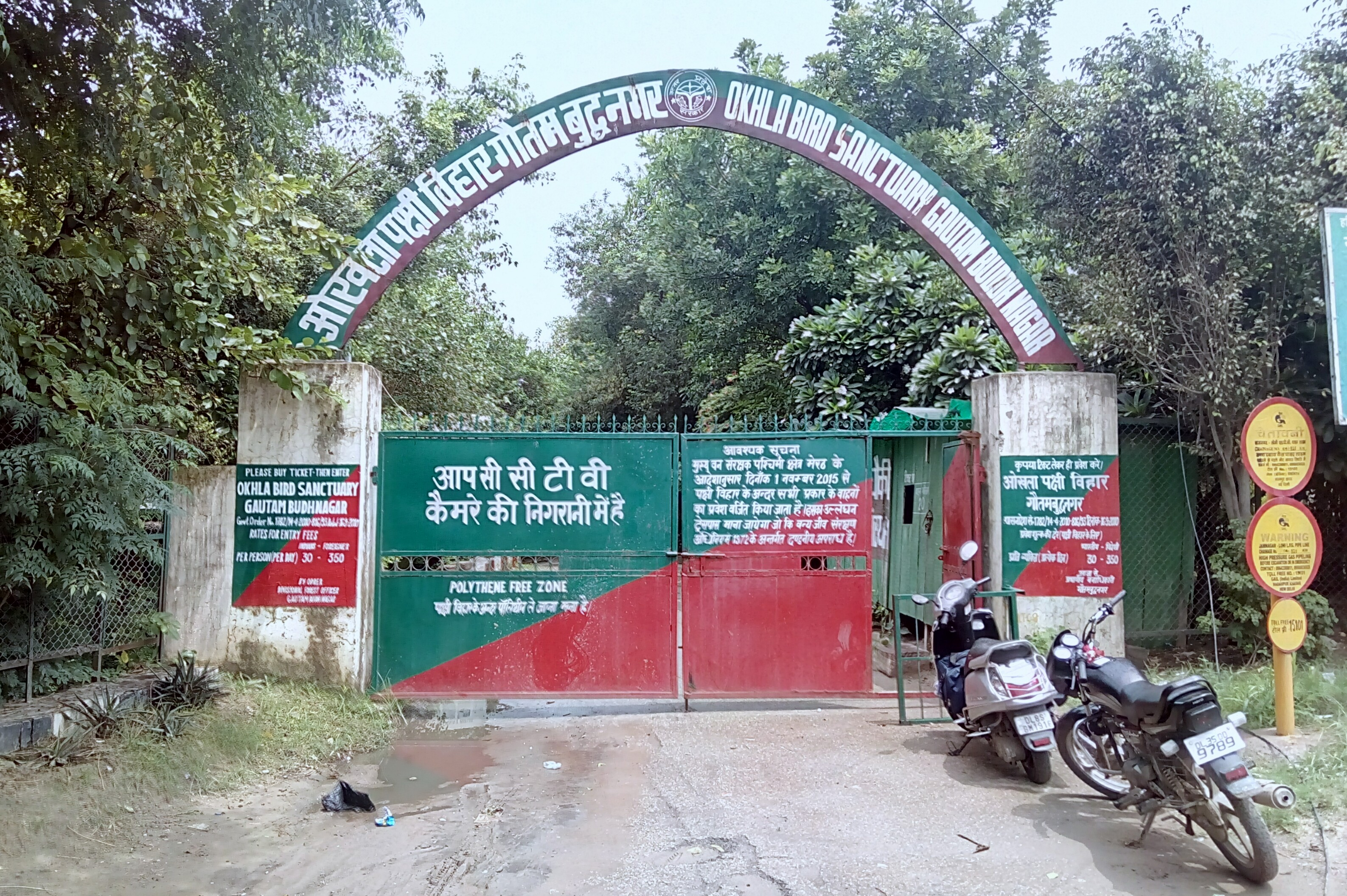 Okhla bird sanctuary Gautam Buddh Nagar